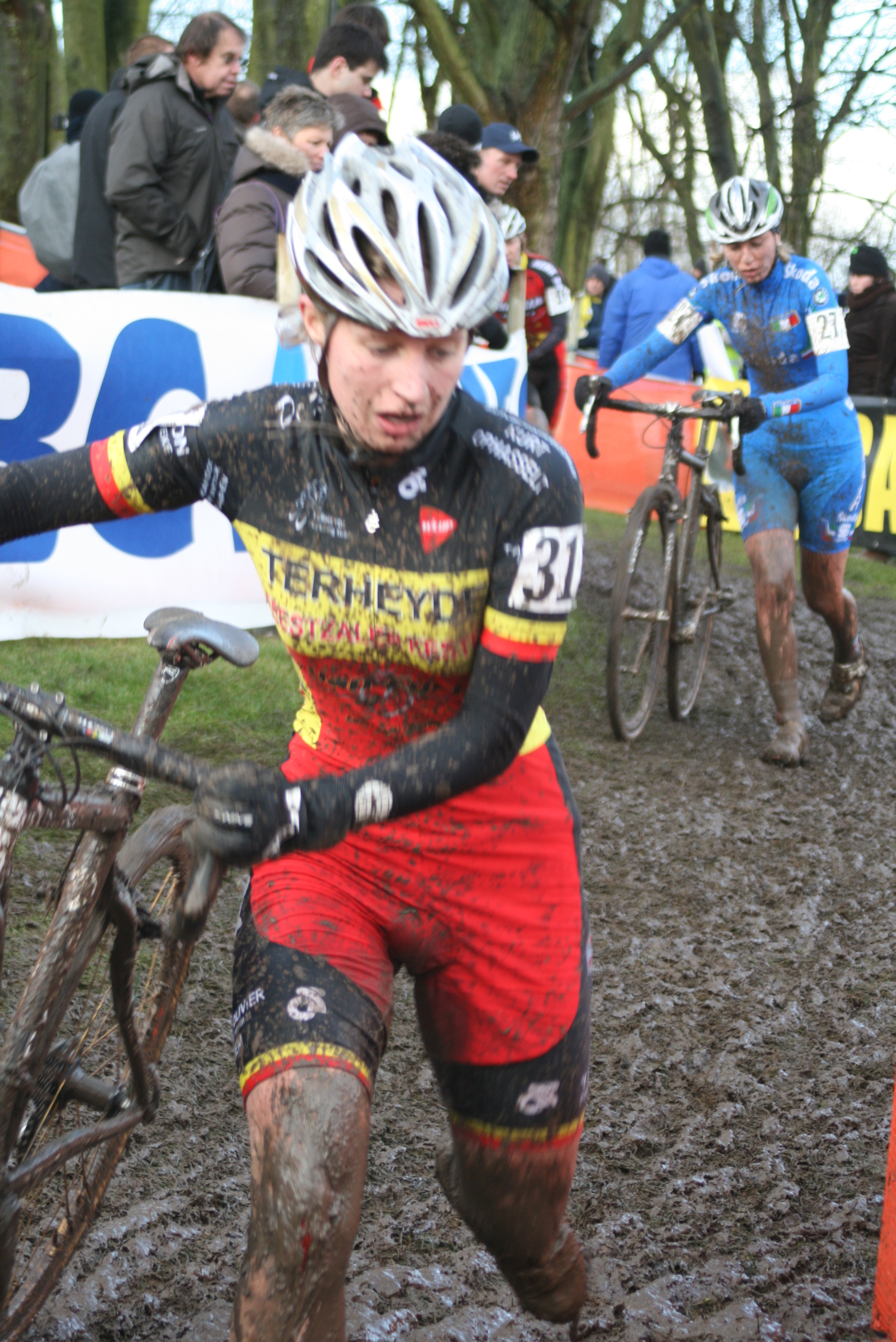 Joyce Vanderbeken, au Grand Prix Lille Métropole 2009